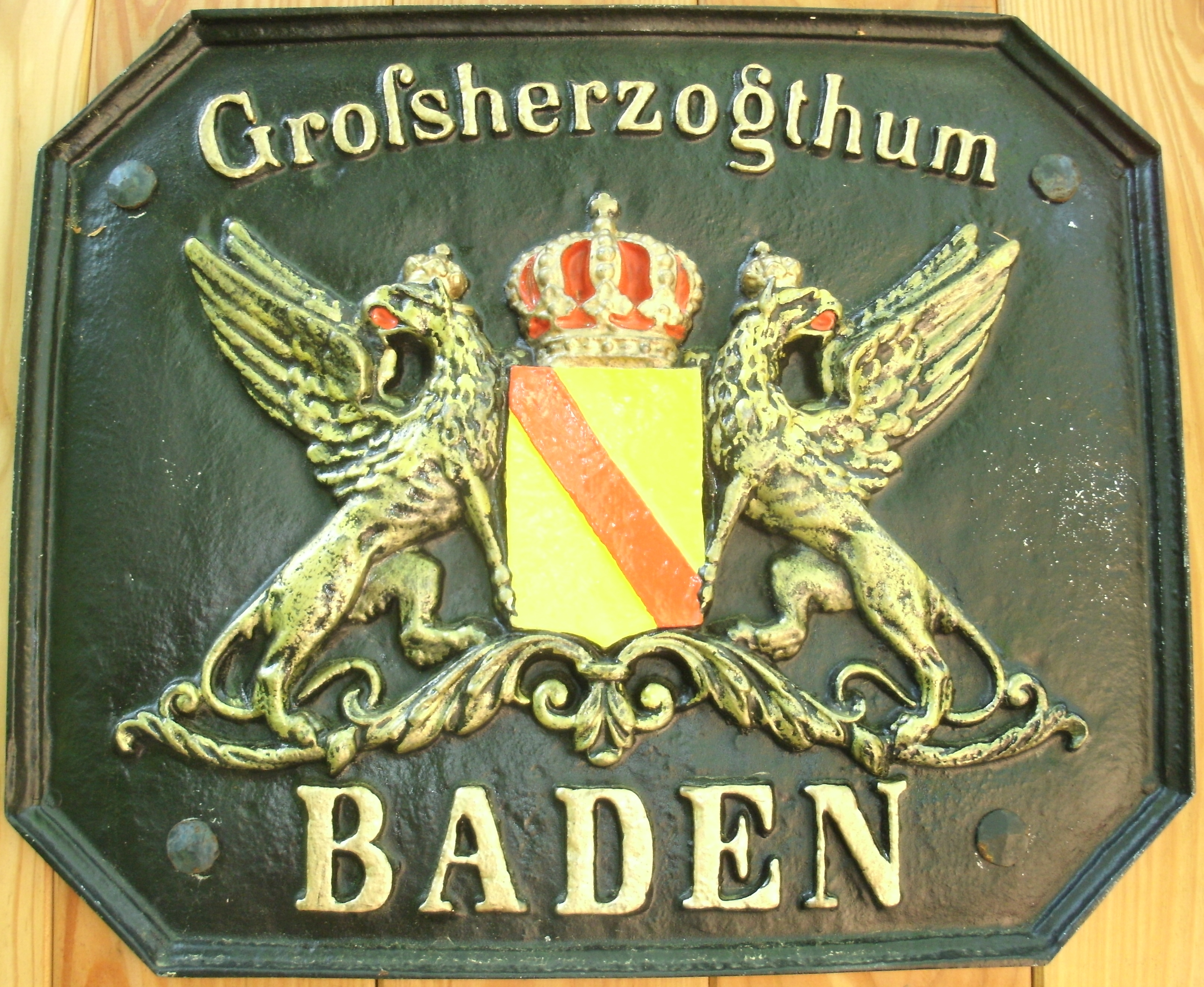 Unweit der Klosterruine am Klosterpfad zwischen Frauenalb und Bad Herrenalb ist die immer noch gültige historische Grenze zwischen Baden und Württemberg mit einem alten Schild markiert.